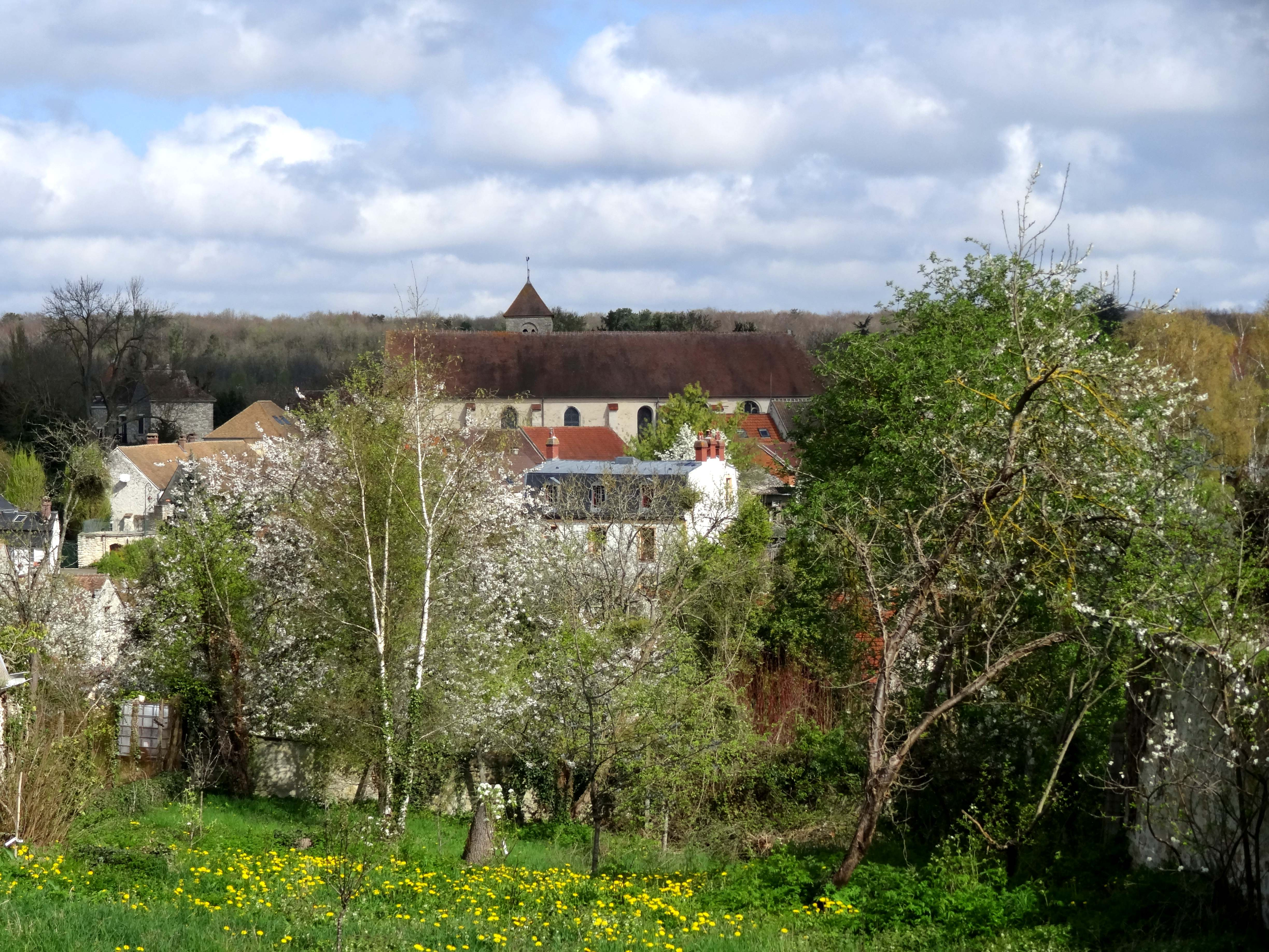 Église Saint-Martin de Follainville - voir titre.